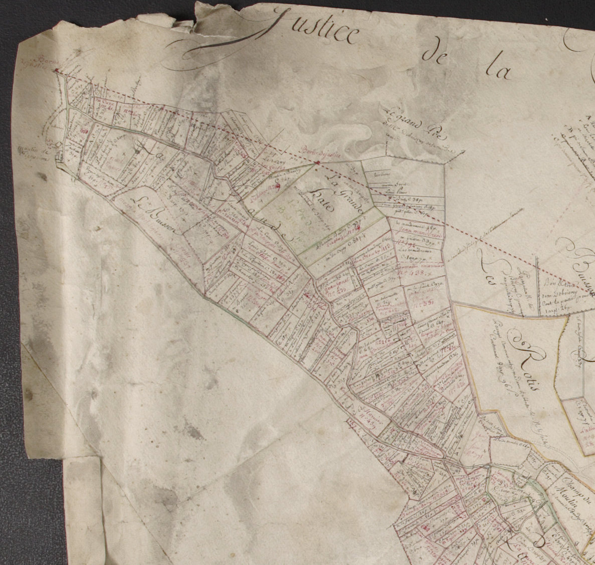 Extrait du terrier de St Laurent de Bourges 1788